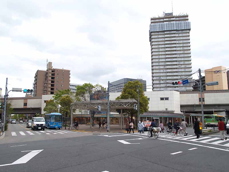 都営地下鉄船堀駅北口。 2007年4月19日Comyu撮影。